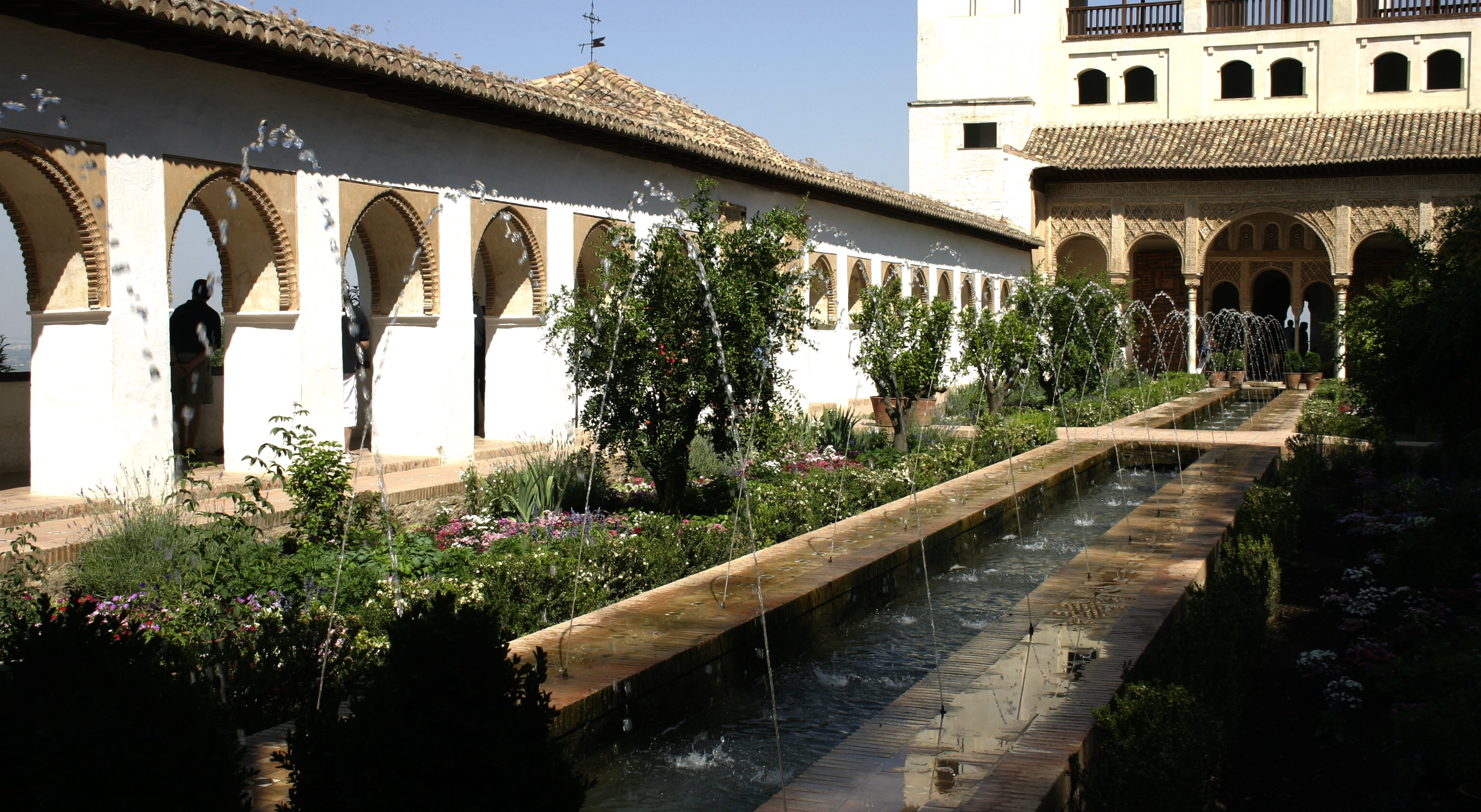 Az Alhambra épületegyütteshez tartozó Generalife-palota udvara, Granada, Spanyolország